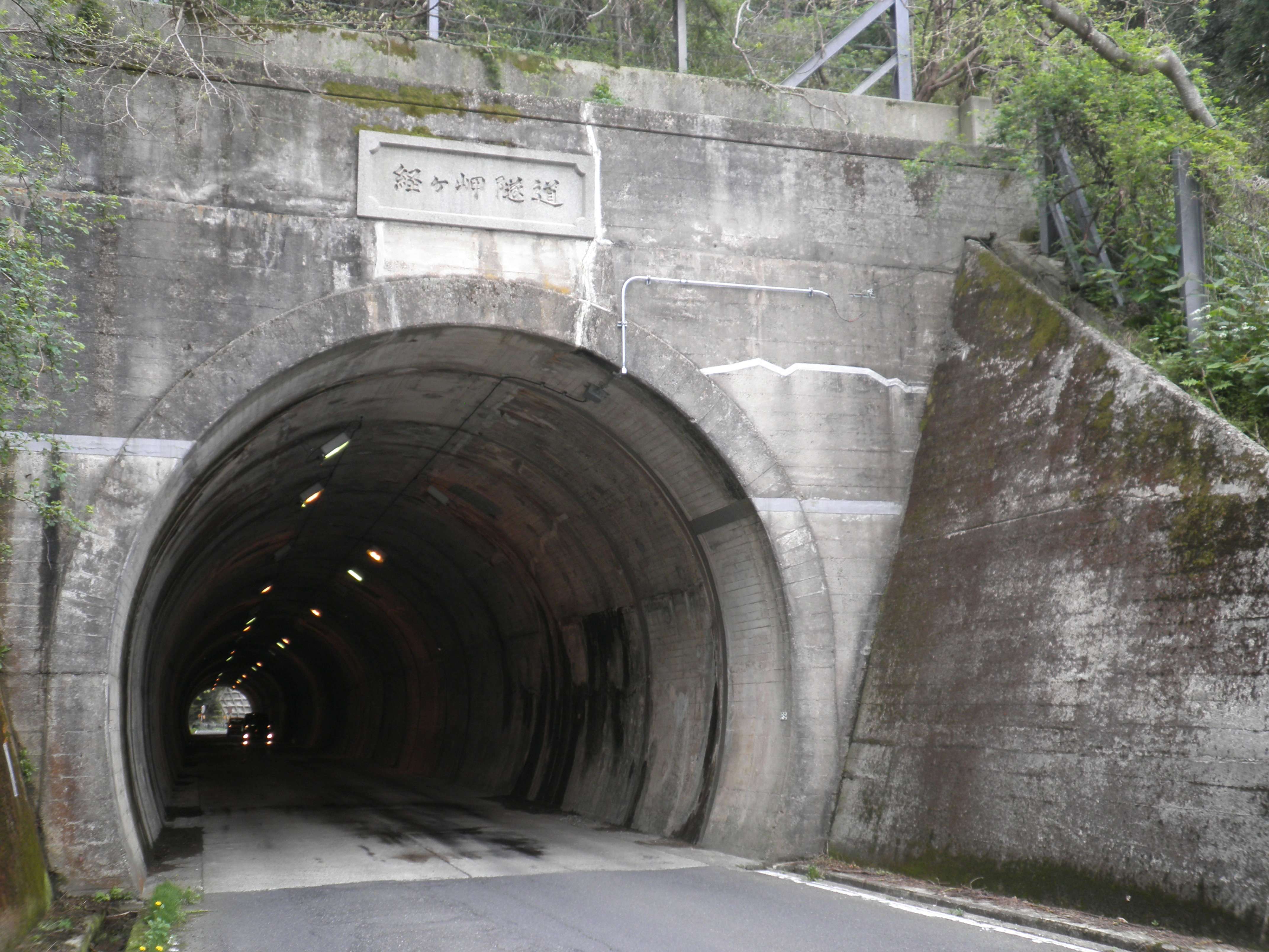 京都府京丹後市の経ヶ岬付近にある経ヶ岬隧道（国道178号線）